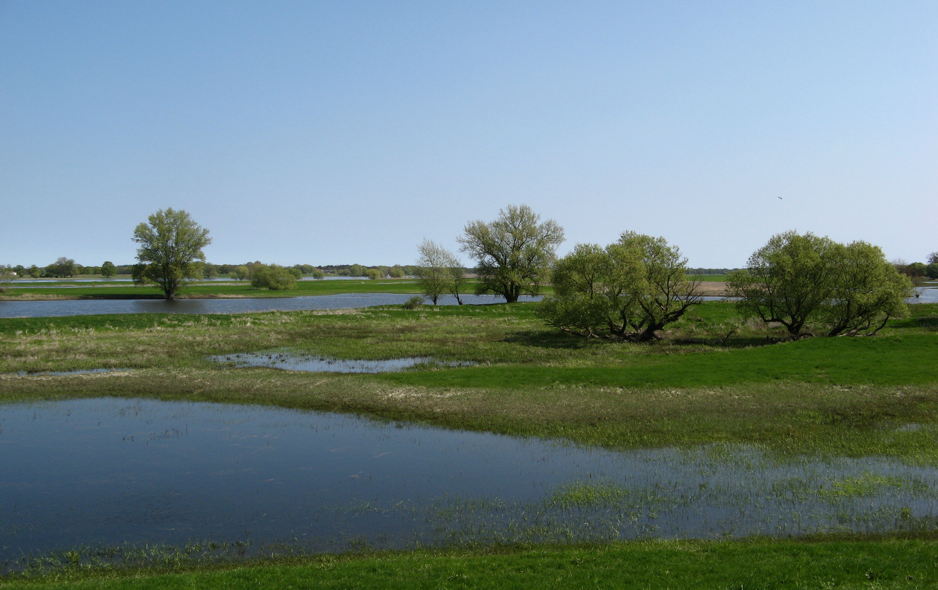 Frühjahrshochwasser im Naturschutzgebiet „Aland-Elbe-Niederung“ (NSG Nr. 388), Sachsen-Anhalt; Alte Elbe, Elbauen